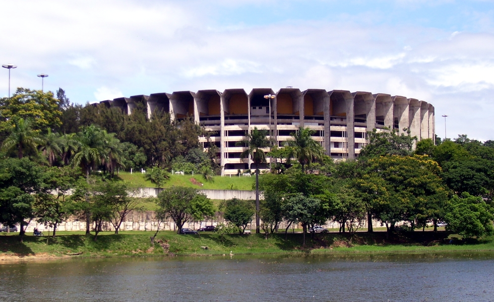 Estádio Jornalista Felipe Drummond, ginásio poliesportivo de Belo Horizonte. Autor: Cid Costa Neto. Data: 17/Dez/2006.